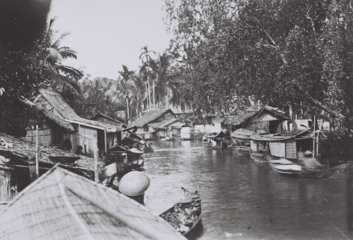 foto. Gezicht over boten en vlotten met winkels in het Kween kanaal tussen de Barito en Martapura rivieren te Bandjermasin op Zuid-Borneo